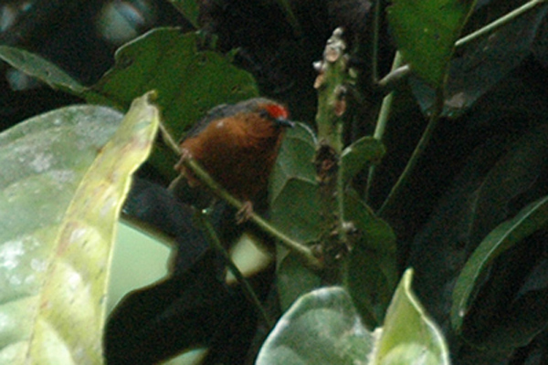 Jameson's Antpecker (Parmoptila jamesoni) male, Uganda